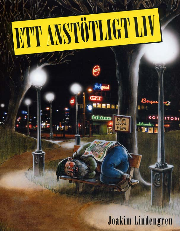 Omslag till Joakim Lindengrens seriealbum Ett anstötligt liv som kom ut 2007 i samarbete mellan Joakim Lindengren och tidningen Faktum.